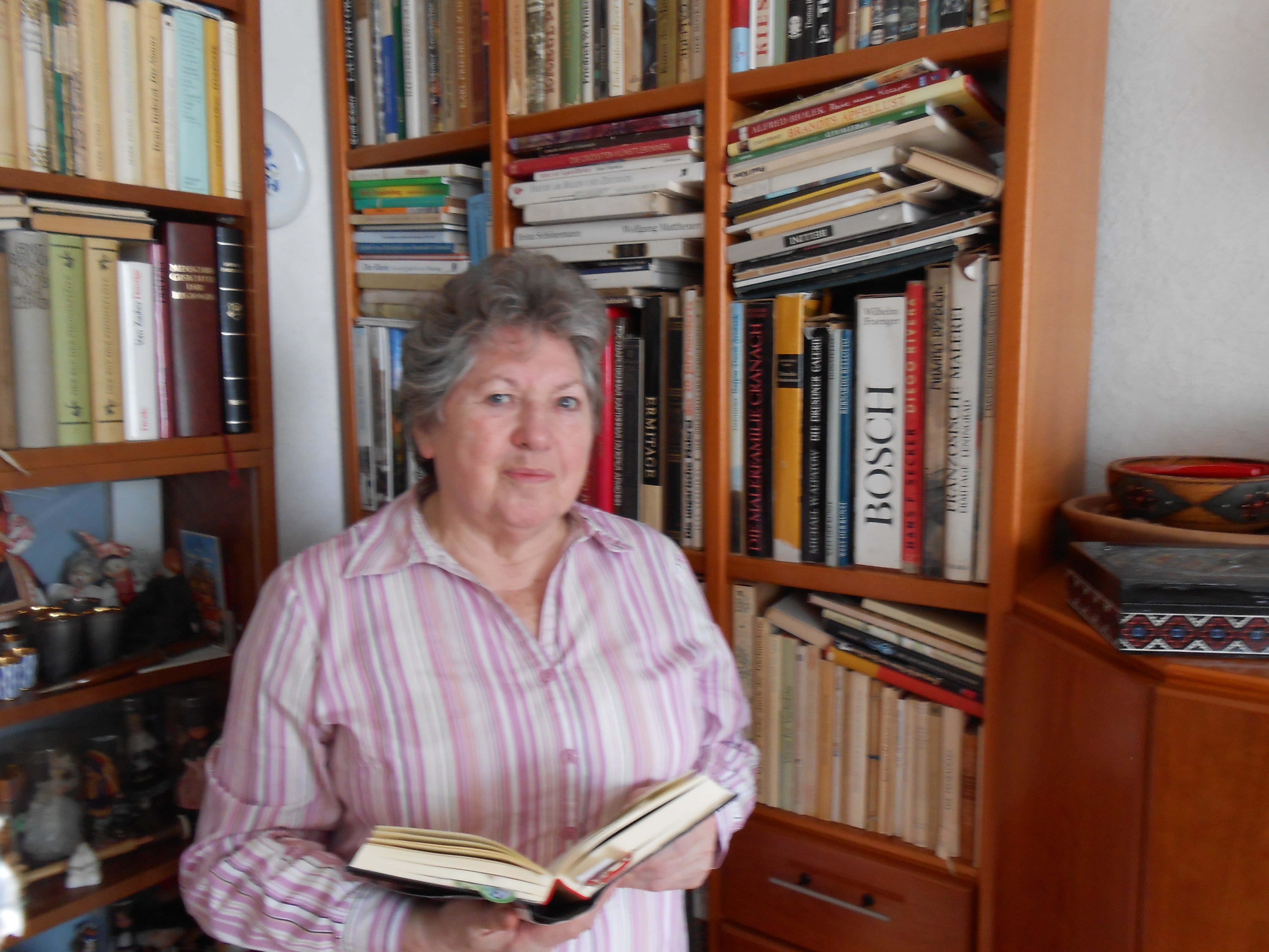 Helga E. Hörz (2014)